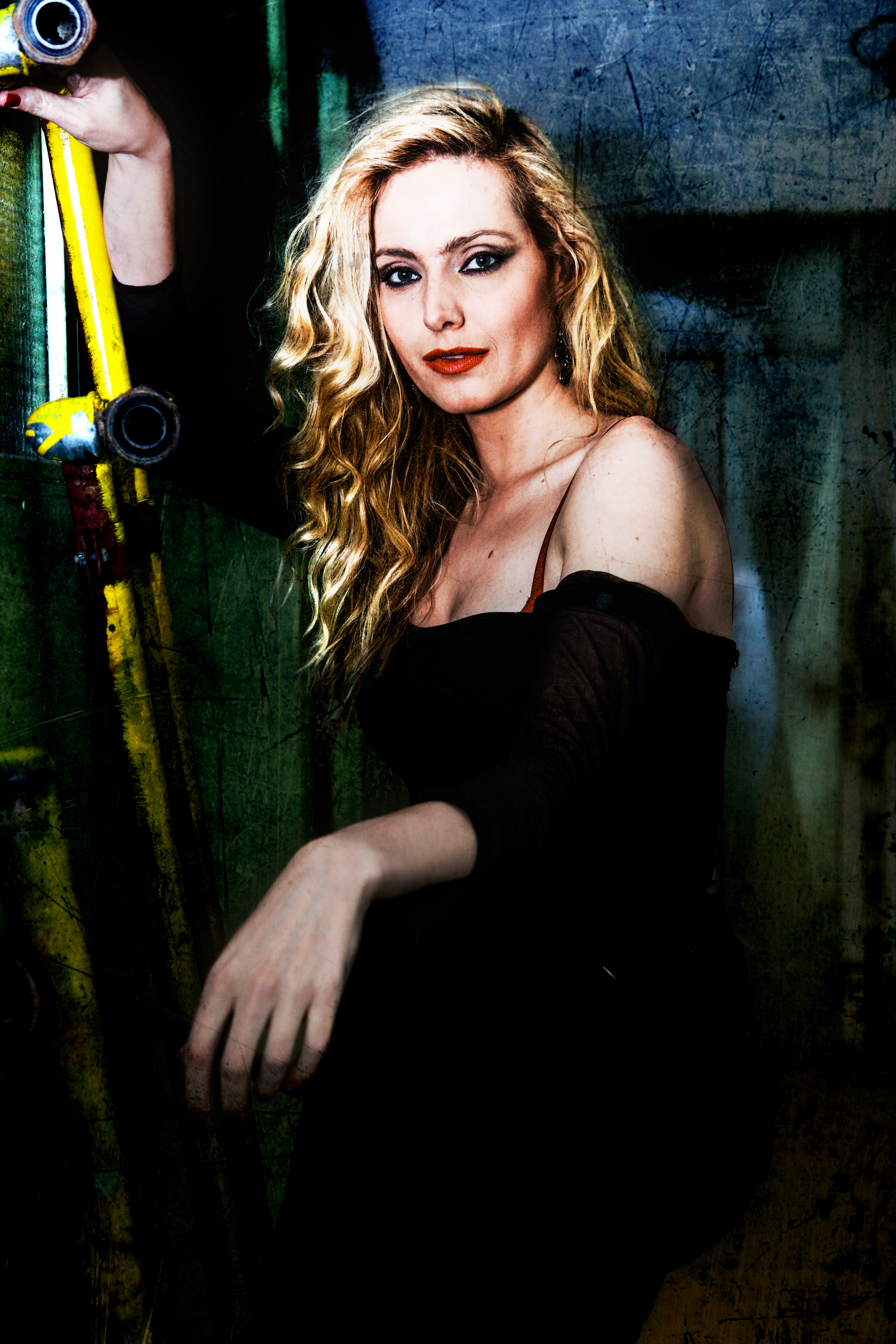 Michaela Horká / RENT